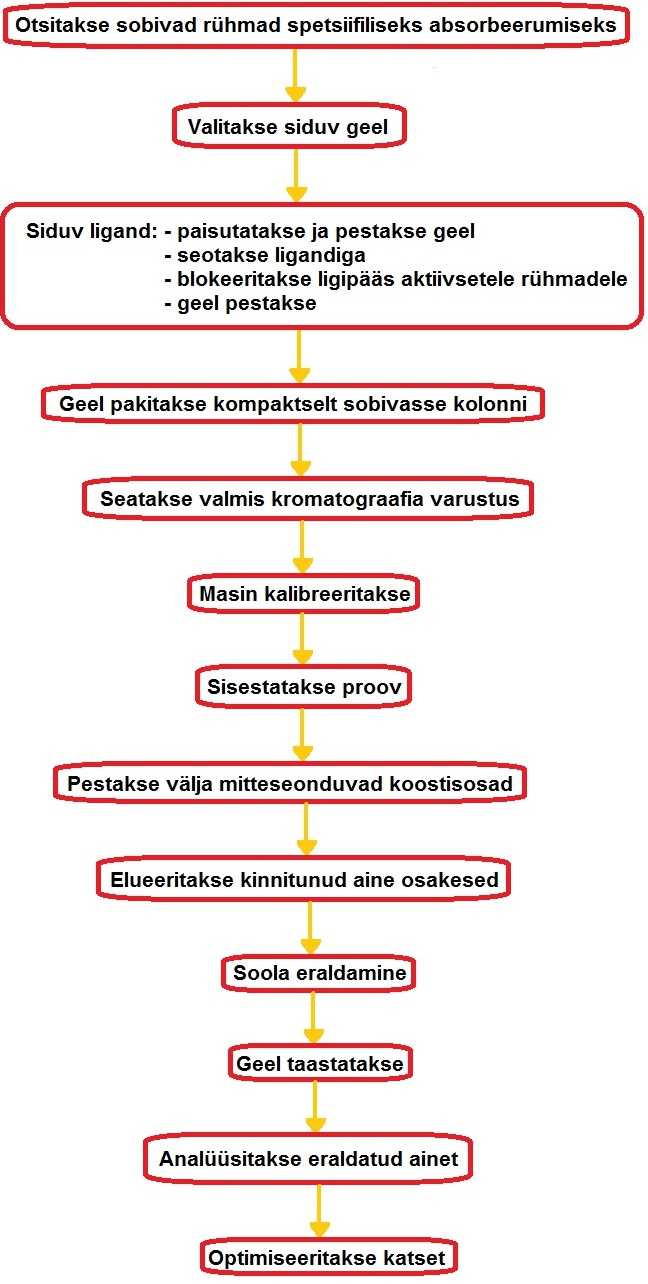 Etapiline seletuskäik